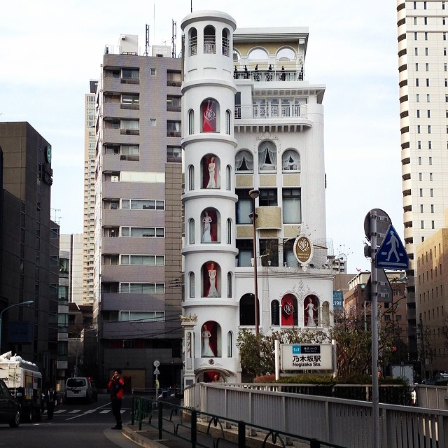 桂由美ブライダルハウス [1]